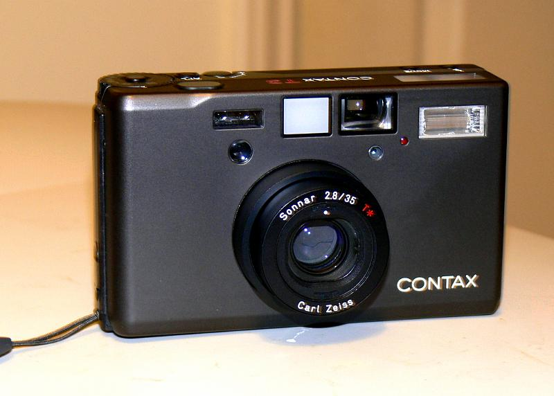 CONTAX T3 black titanium autofocus compact camera